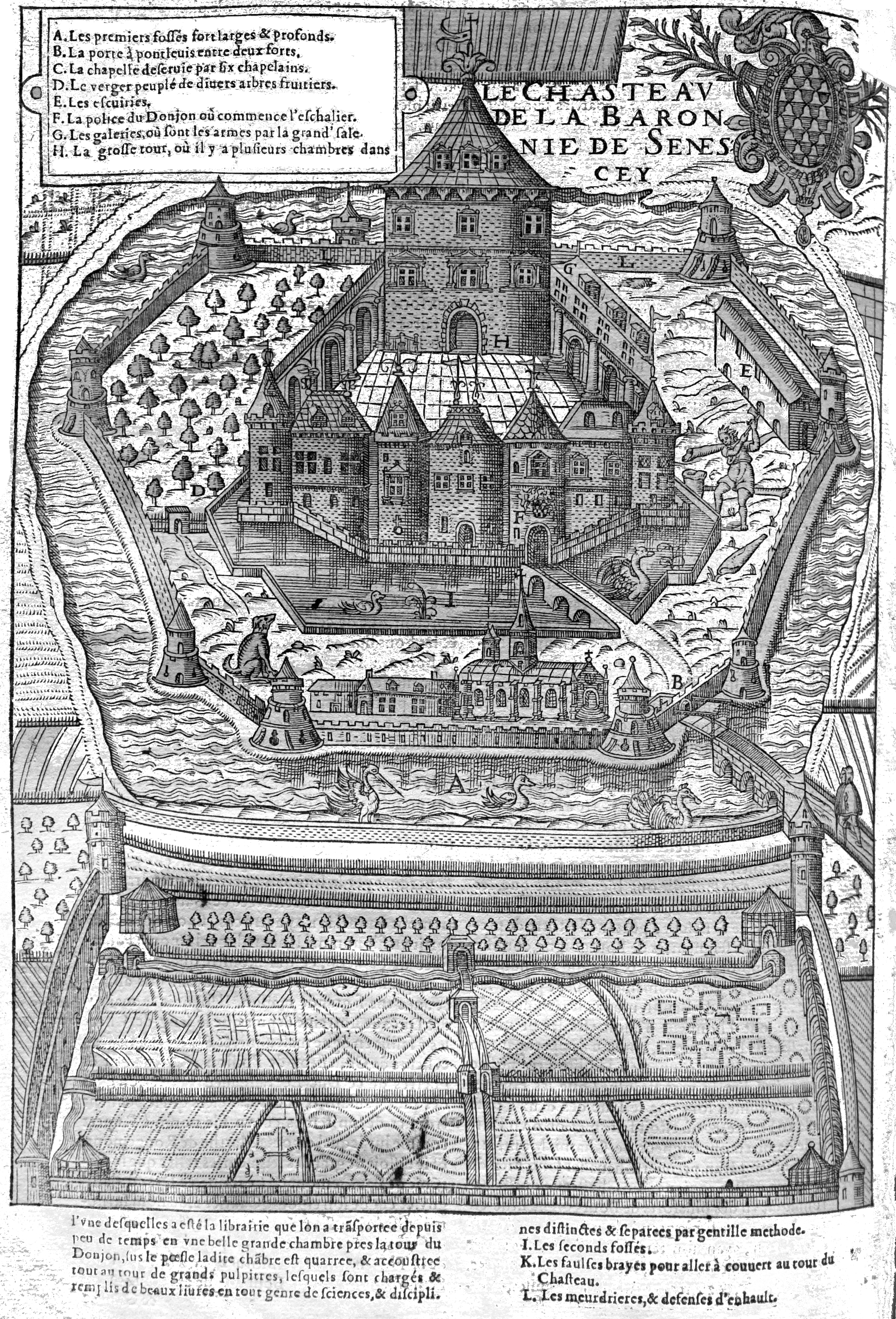 extrait du livre "Cosmographie universelle" de Belleforest.